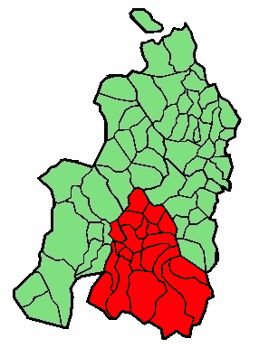 aipaturiko eskualdearen kokapena Nafarroa Beherean